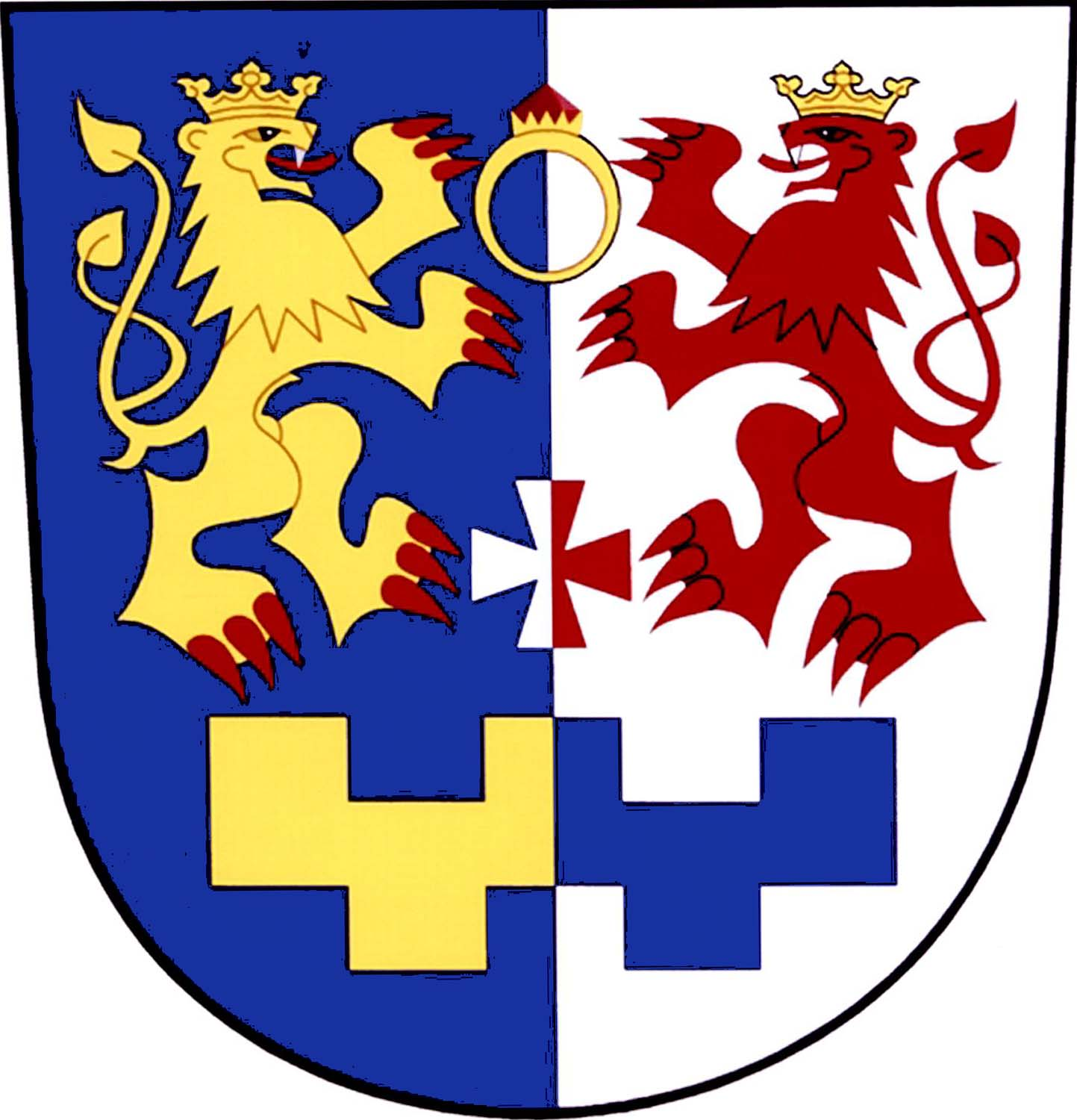 Česky: znak obce Bílé Poličany